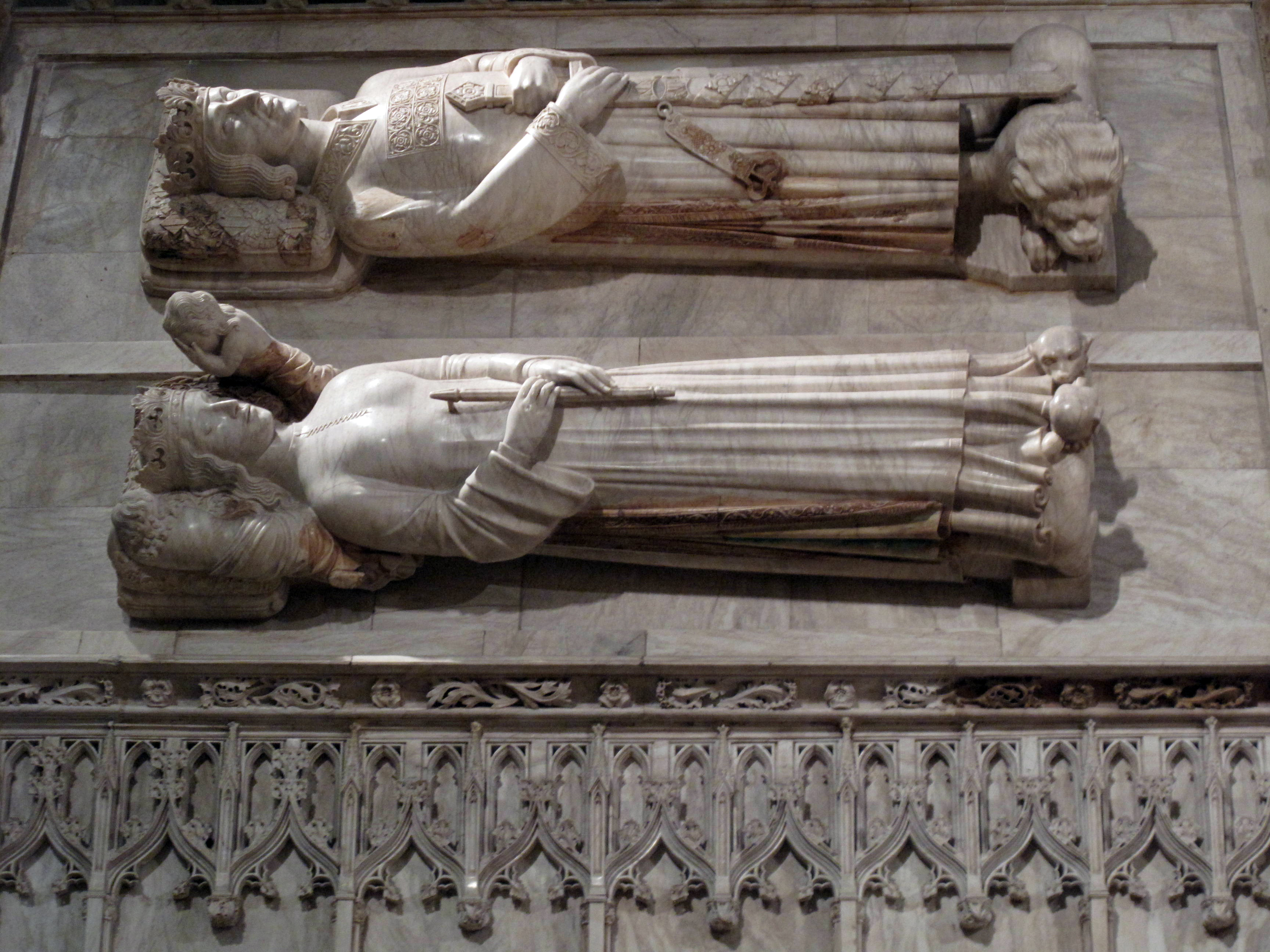 Monestir de Santa Maria de Poblet (Vimbodí i Poblet)